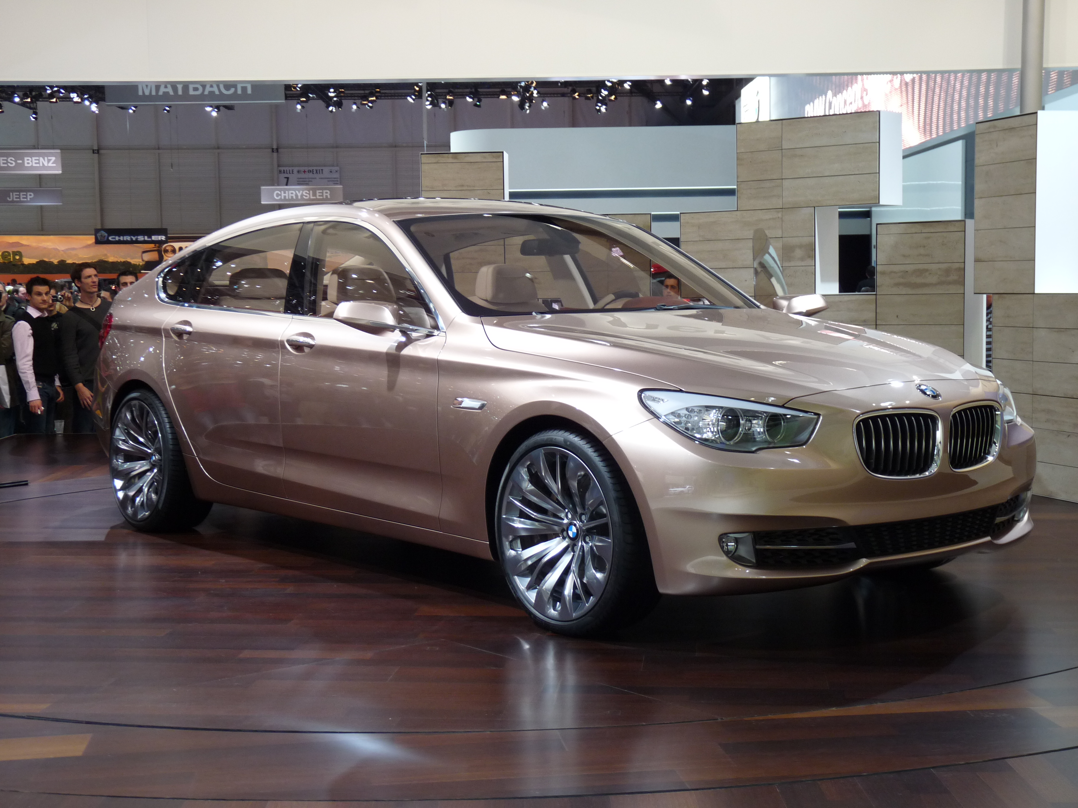 BMW 5 Series GT Concept au Salon de Genève 2009